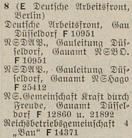 Stromstraße 8 in Adressbuch der Stadt Düsseldorf 1938